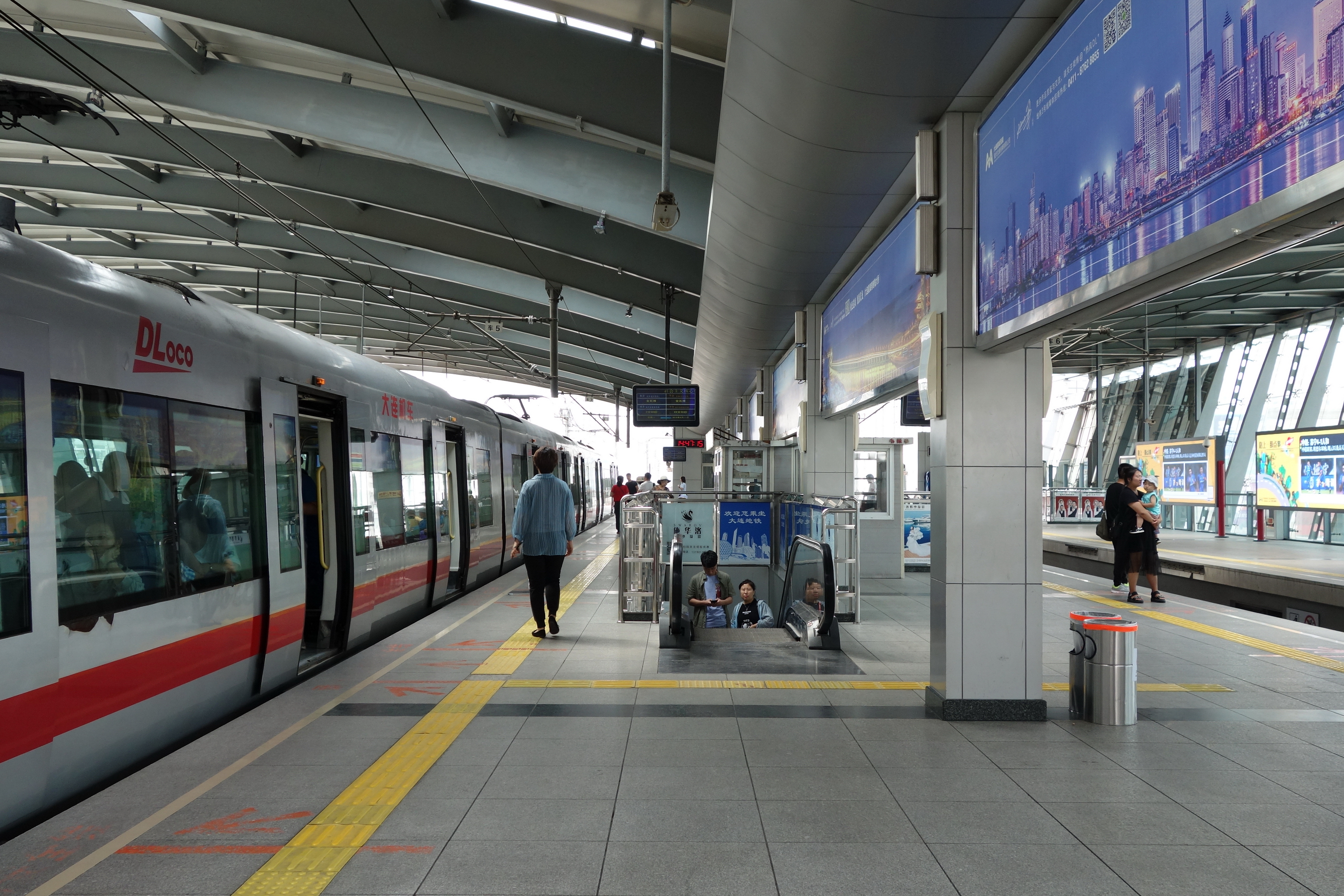 大连地铁3号线大连站西班牙式月台布局